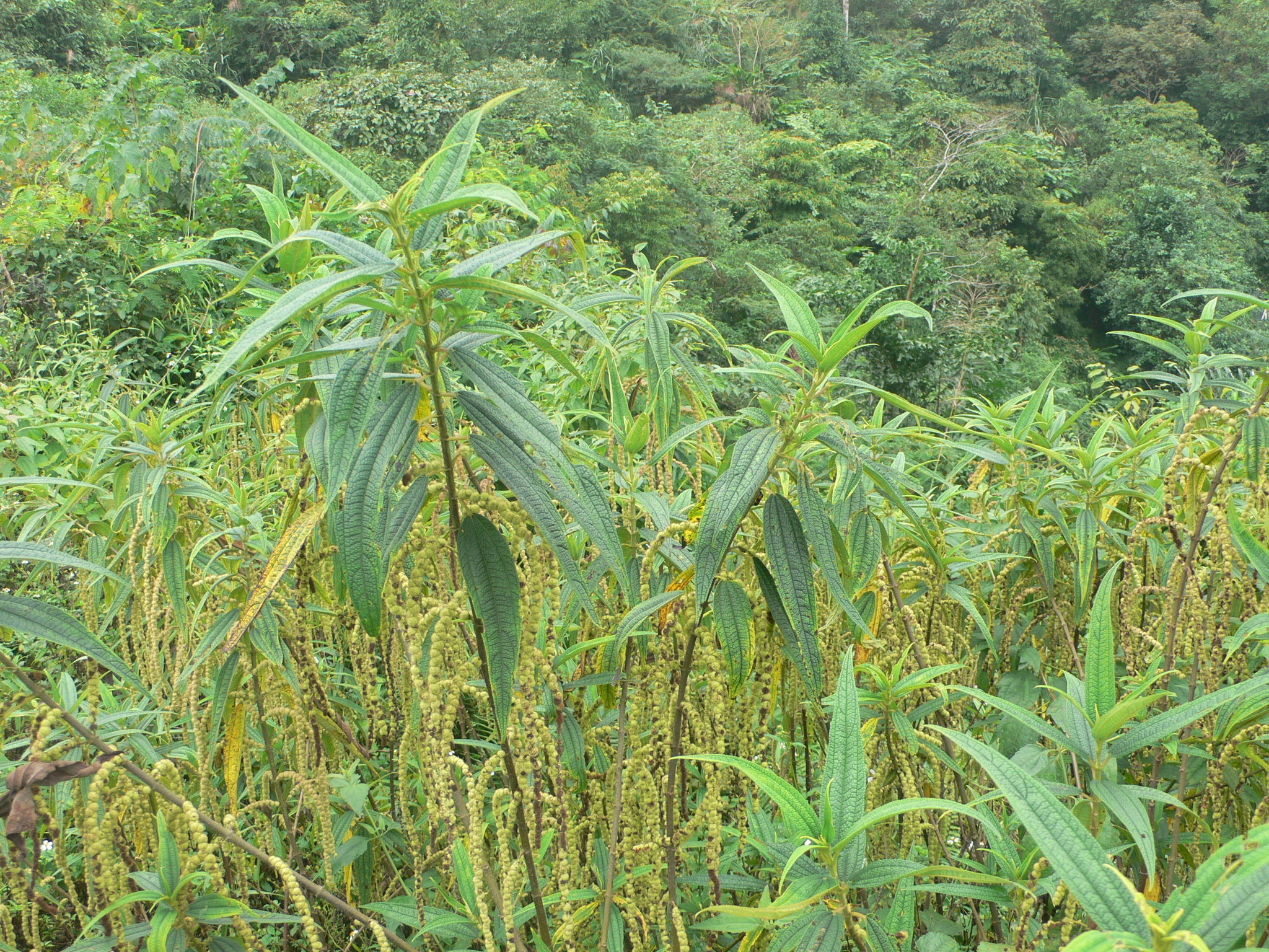 Cây Gai hoa rủ